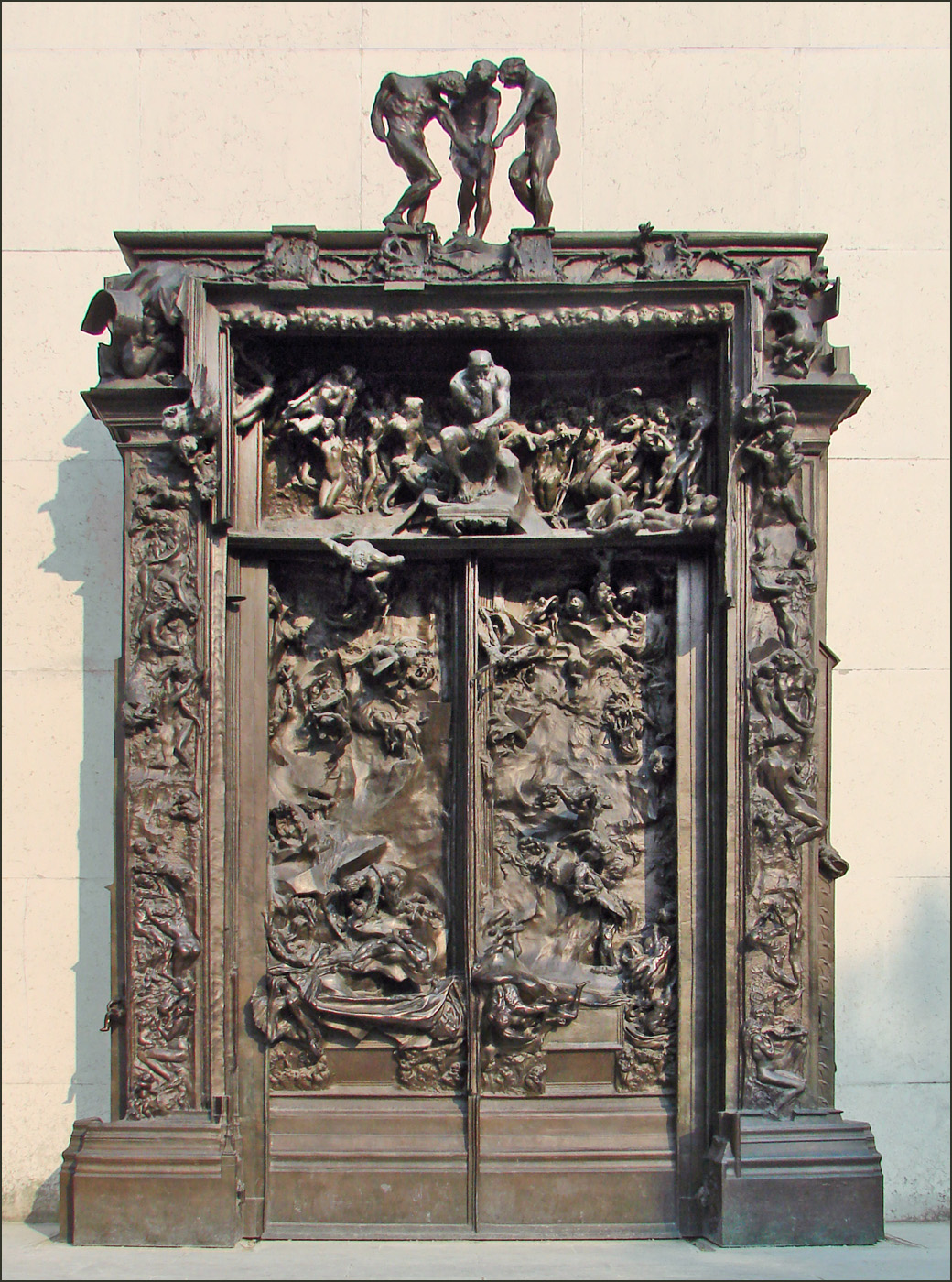 La Porte de l'Enfer a été dressée dans les jardins du musée Rodin en 1937. L'oeuvre de Rodin semble avoir été achevée vers 1890. voir le site du Wikipedia site officiel du musée